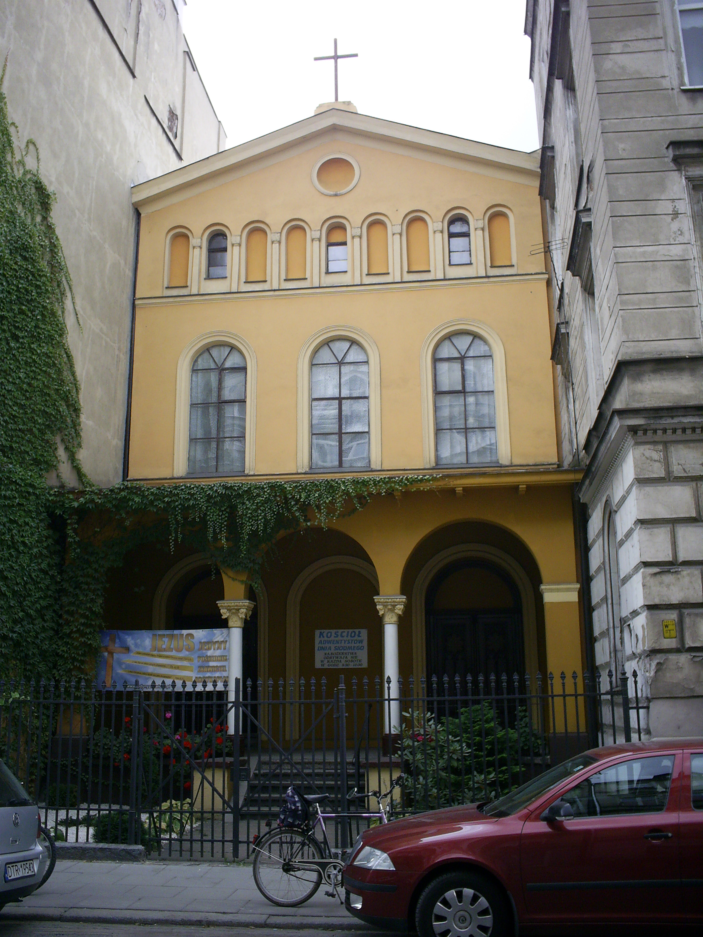 Sala Zgromadzeń Katolickiej Wspólnoty w Chrystusie, ob. zbór Kościoła Adwentystów Dnia Siódmego Dąbrowskiego 14/16, Miasto Wrocław - Krzyki